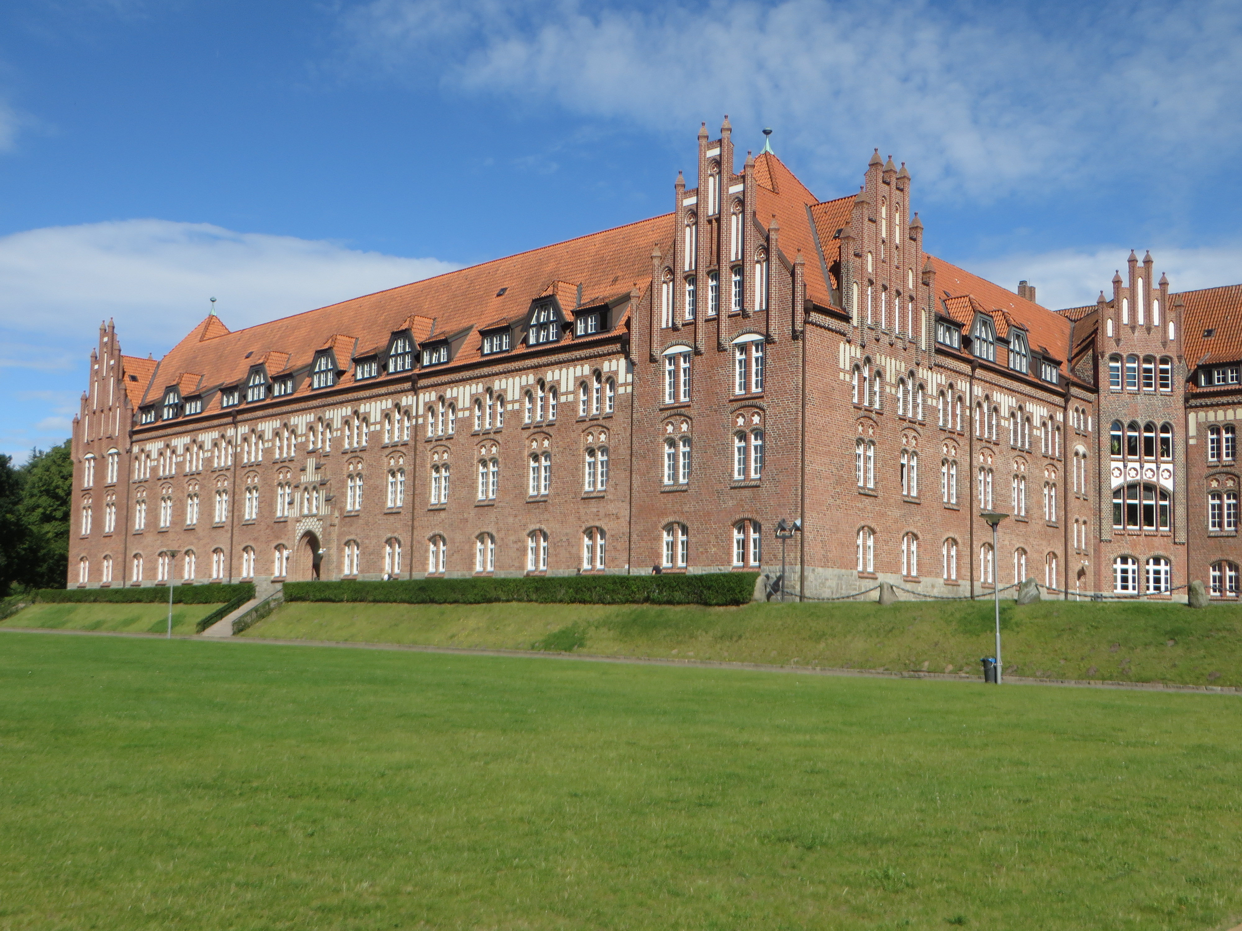 Zollschulflügel, Nordflügel der Marineschule Mürwik (Flensburg 16 August 2016), Bild 01